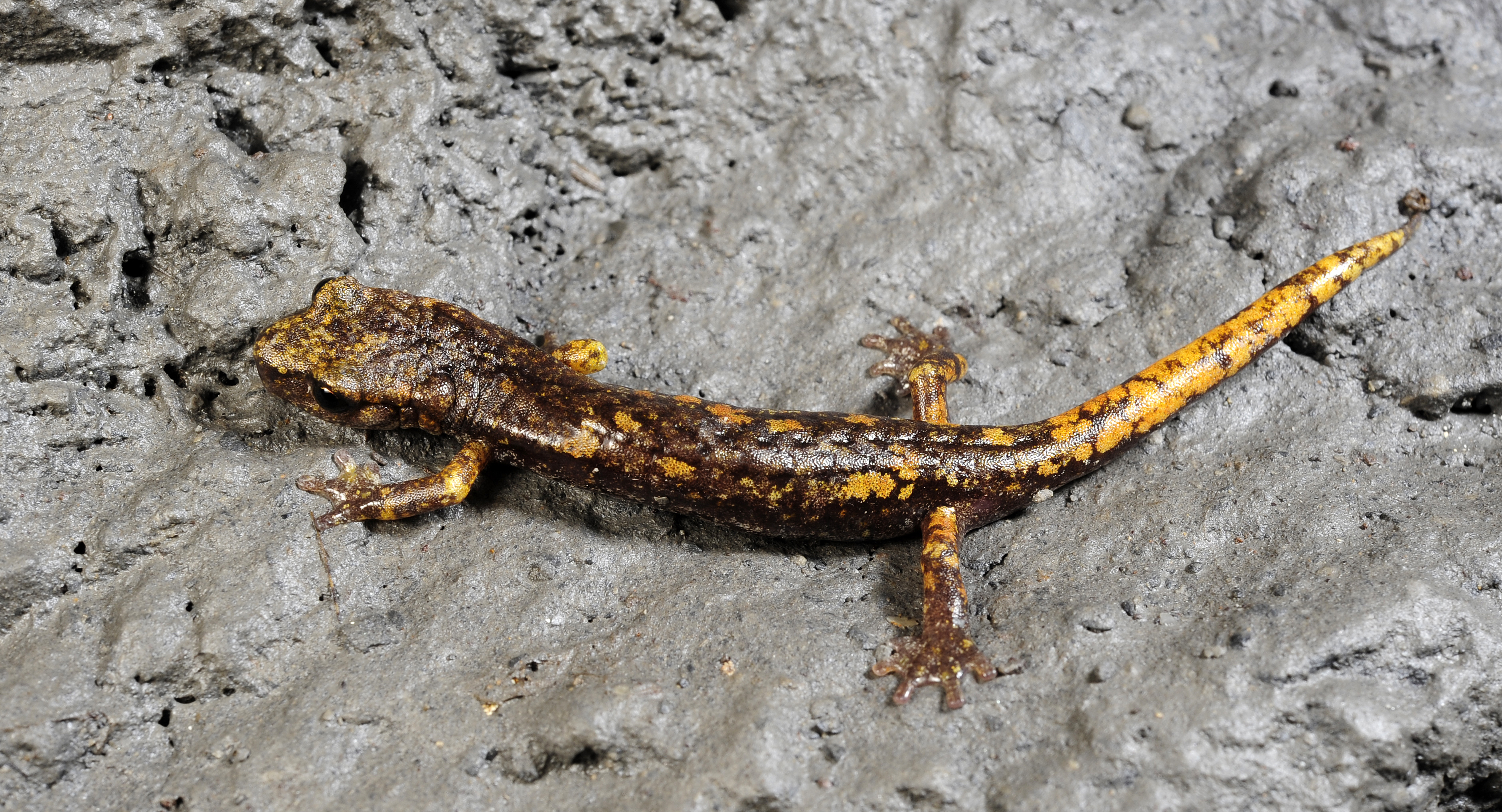 Ligurischer Höhlensalamander (Speleomantes strinatii)